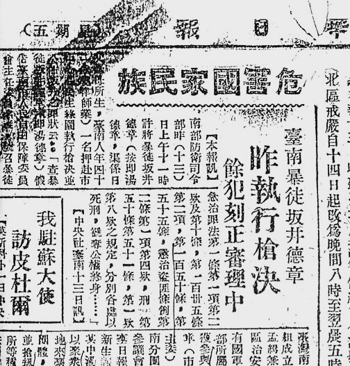 中文（台灣）: 1947年3月14日中華日報報導：湯德章（原姓坂井）遭軍方在臺南市民生綠園公開槍決的消息。